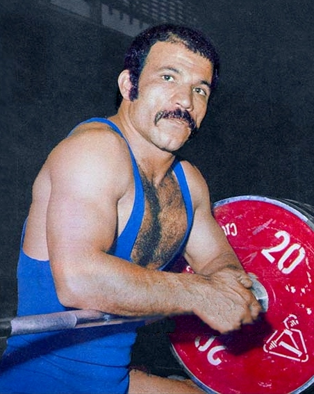 Mohammad Nassiri